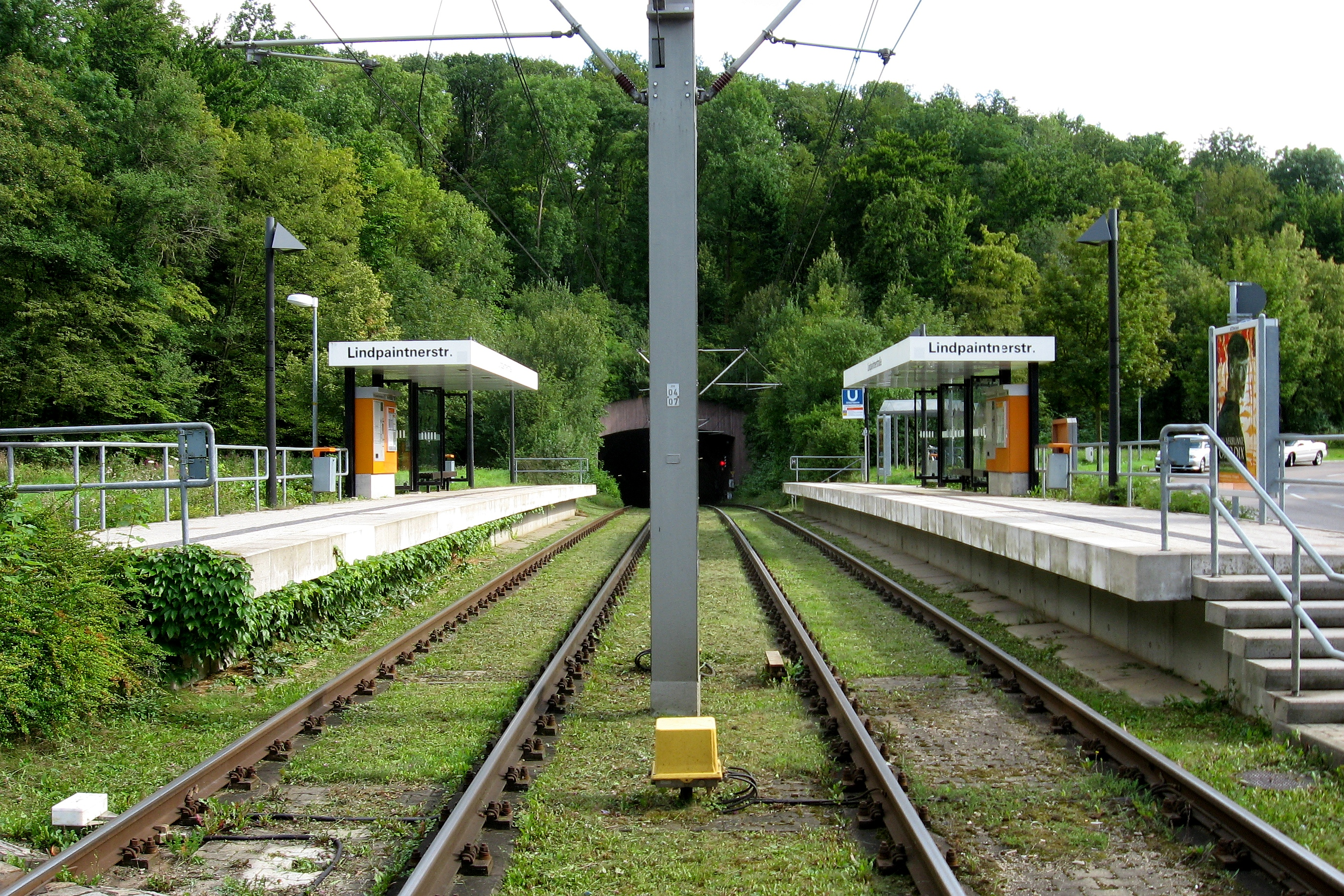 Haltestelle Lindpaintnerstraße der Stadtbahn Stuttgart